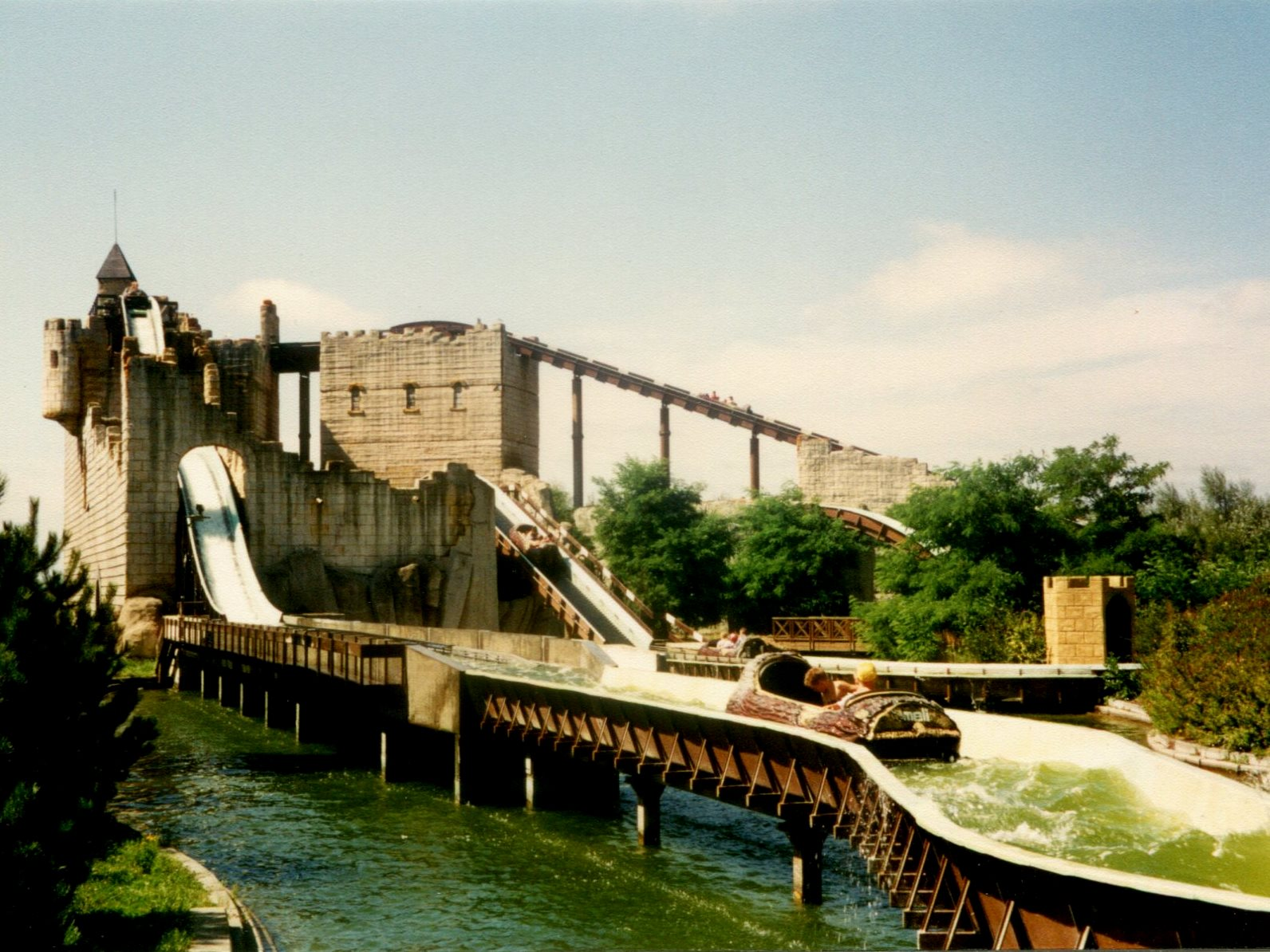 MeliparkSplash